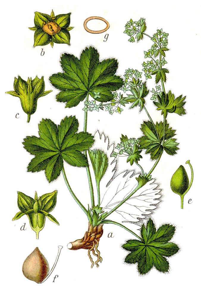 Alchemilla fissa Günther & Schummel Original Caption Gespaltener Sinau, Alchemilla fissa